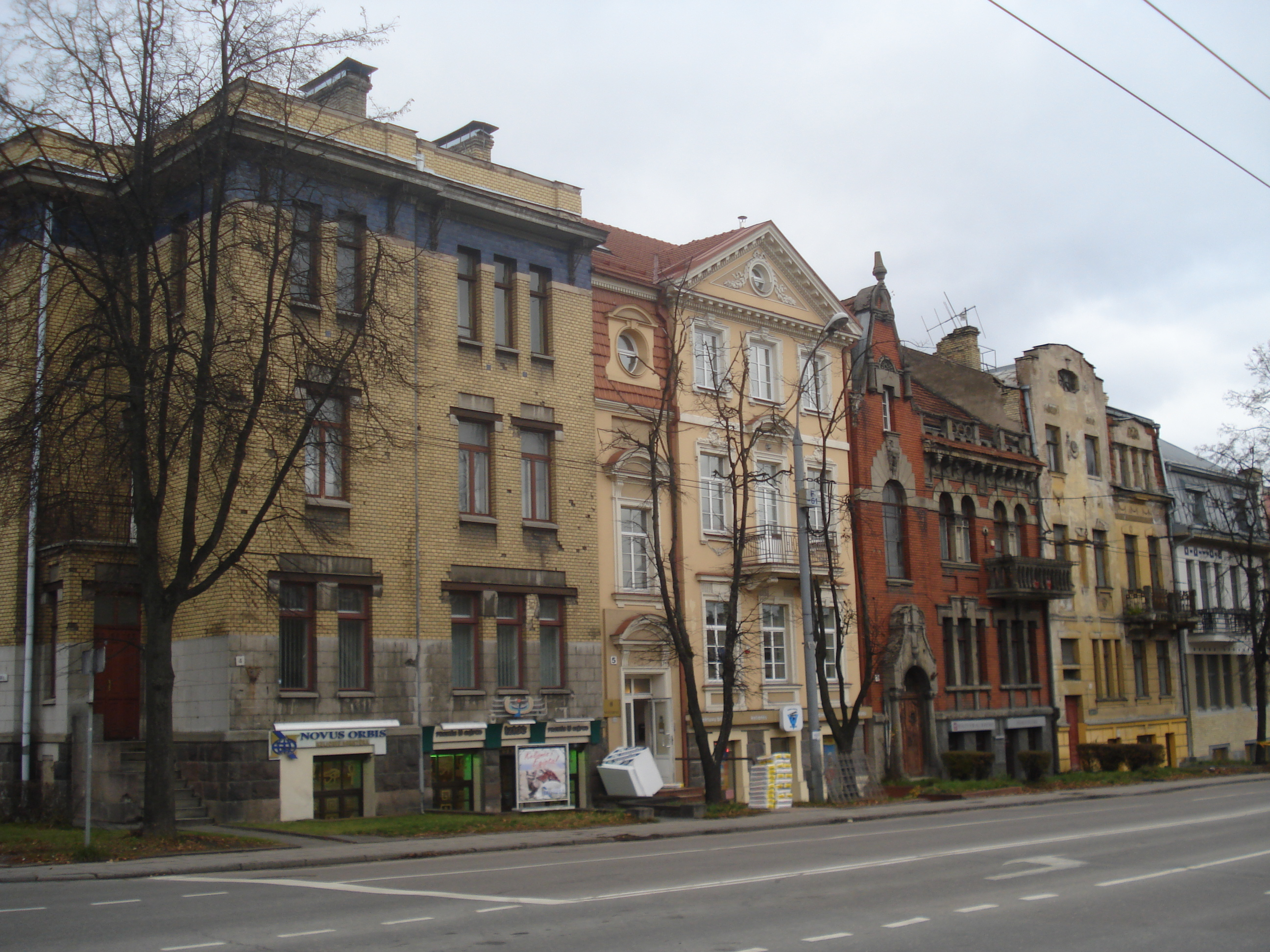 Kolonia Montwiłłowska na Łukiszkach. Houses build by August Klein in 1911. Tumo-Vaižganto g., Vilnius